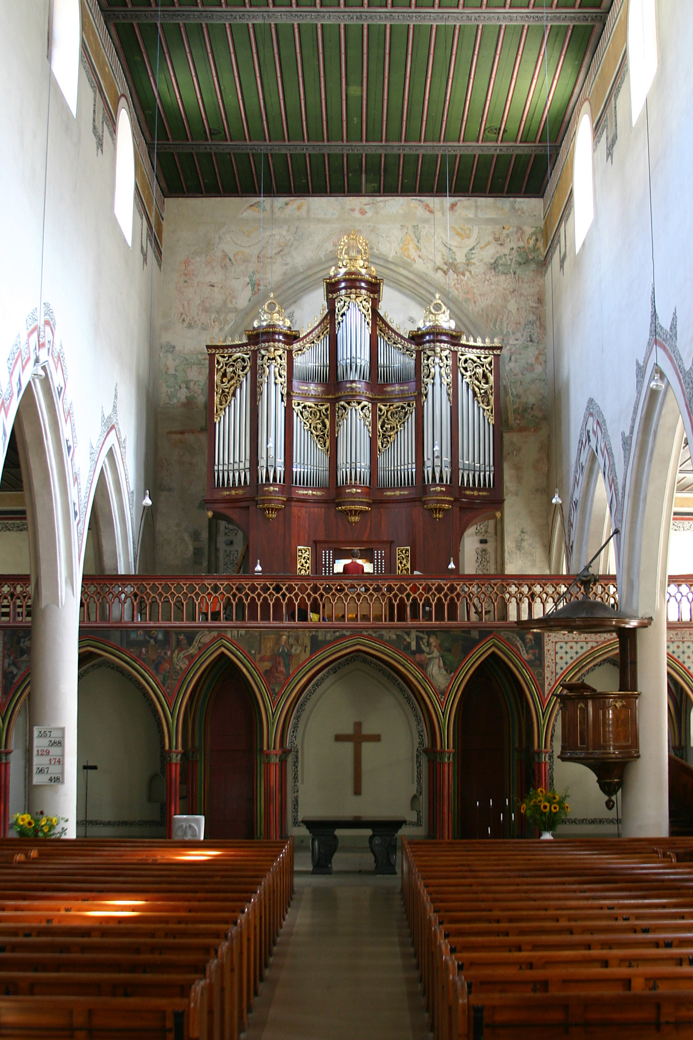 Französische Kirche, Bern, Schweiz